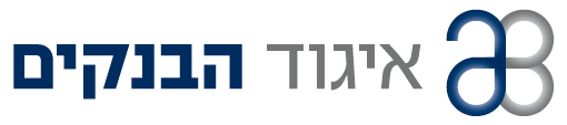 לוגו איגוד הבנקים בישראל